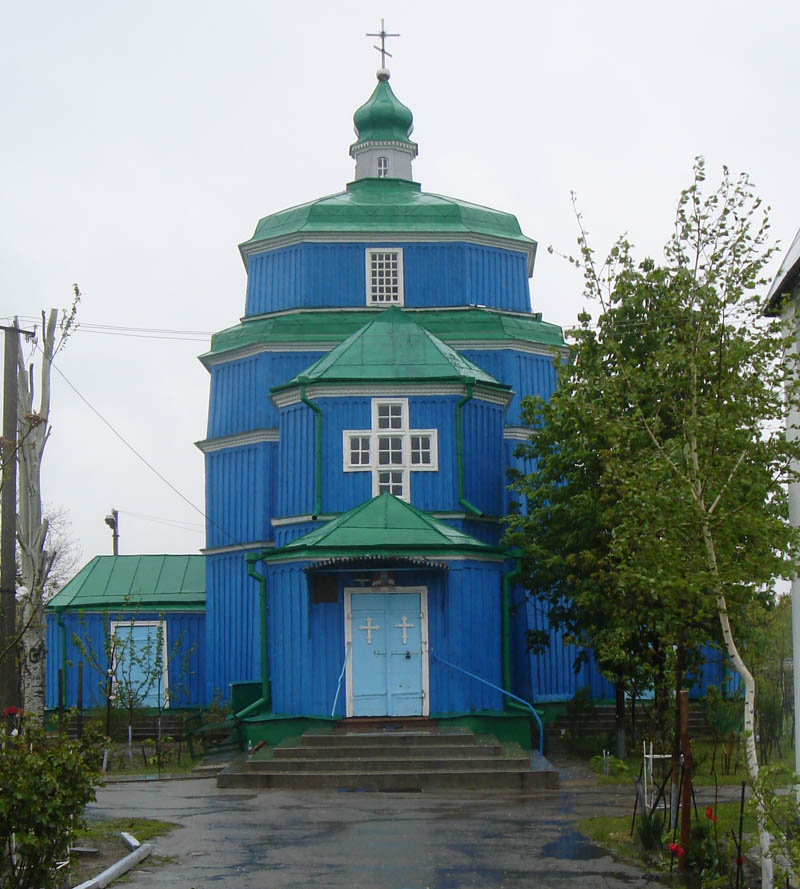 Козацький храм XVIII ст.